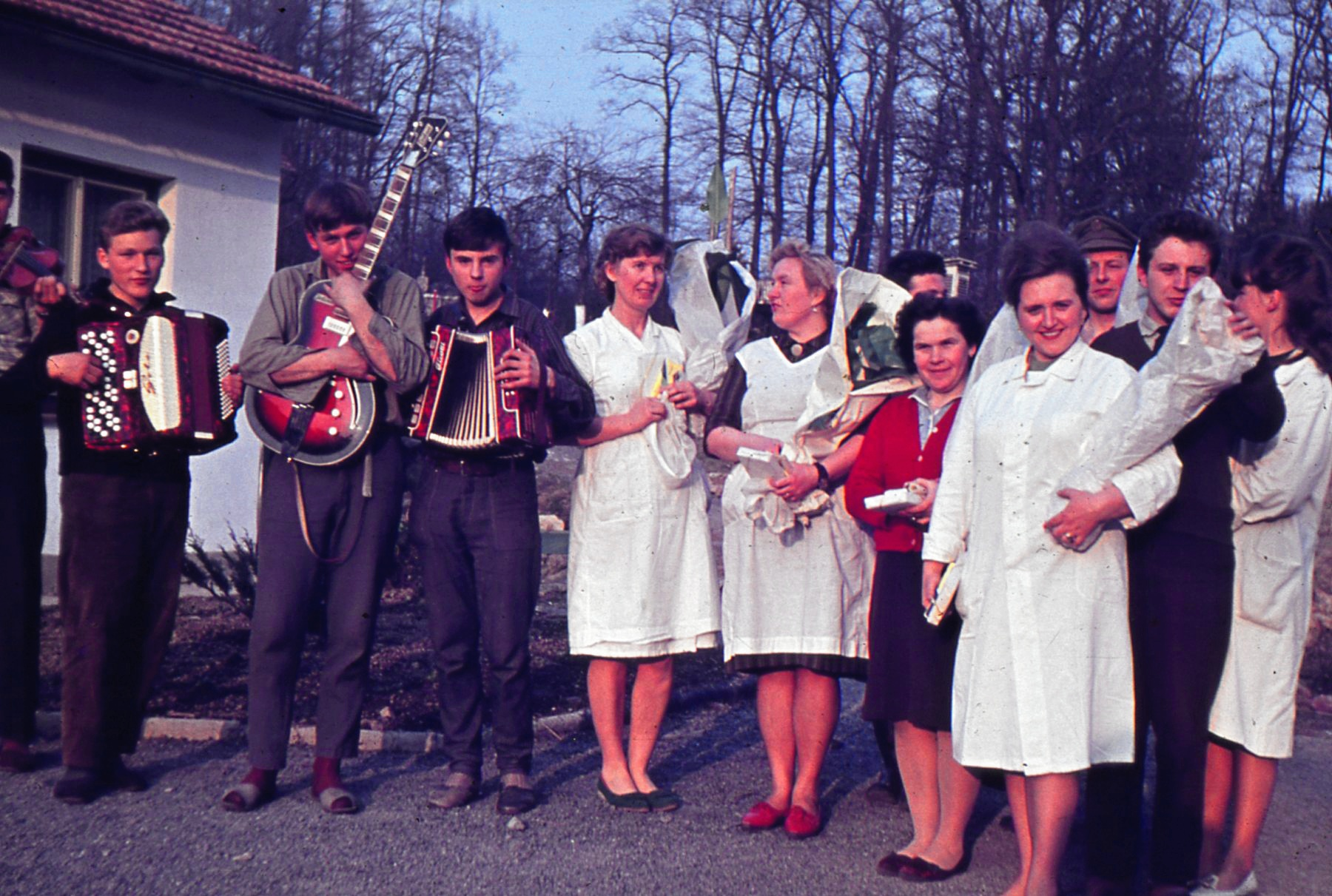 Oslava MDŽ v 60. letech, ženský personál a estrádní spolek učiliště v Křivoklátě